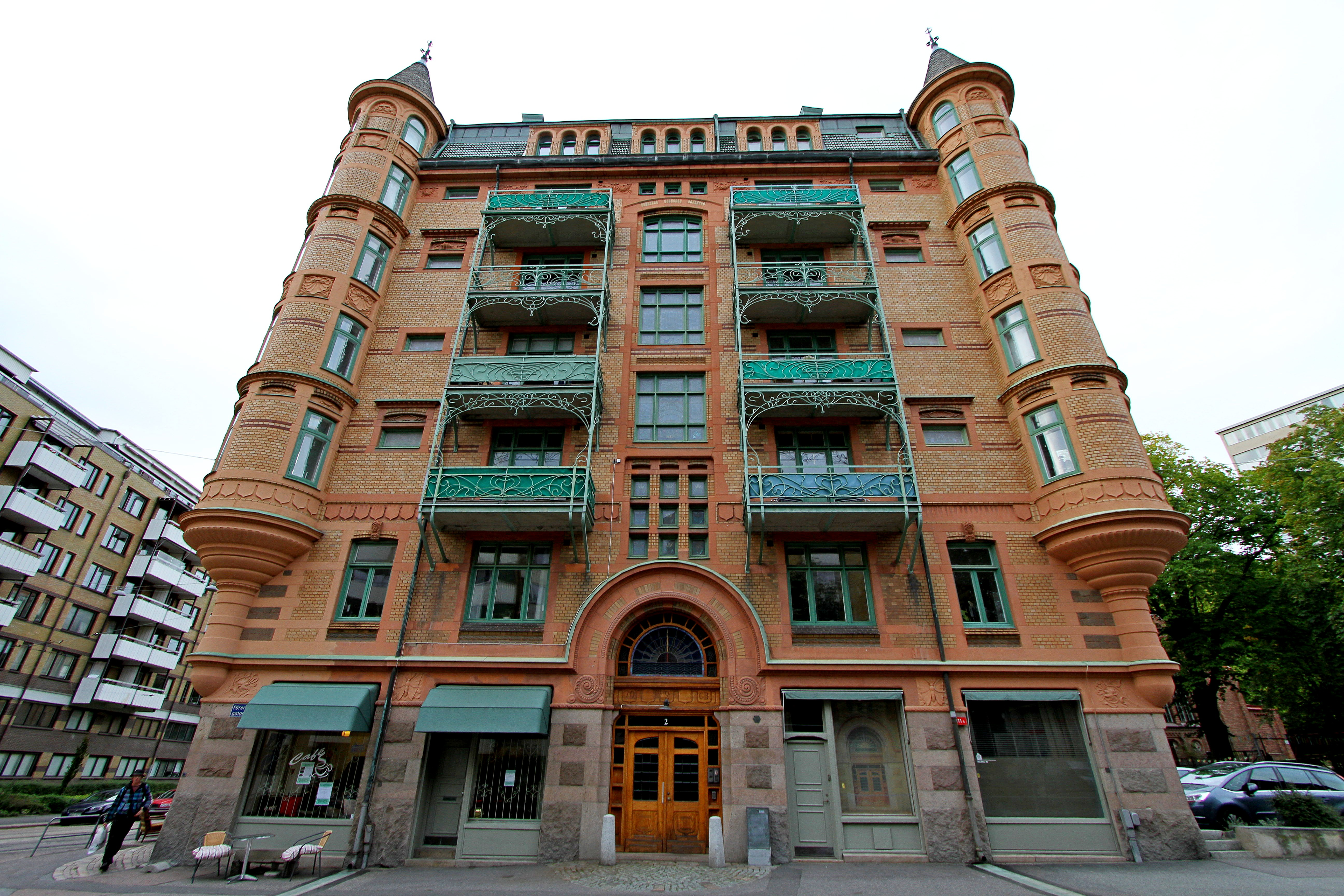 Bostadshus med sju våningar i stadsdelen Annedal.